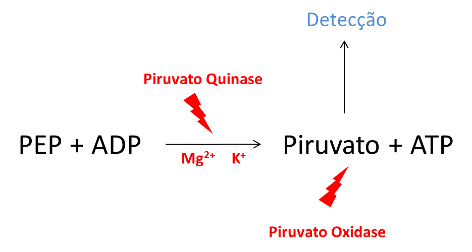 detecção pk